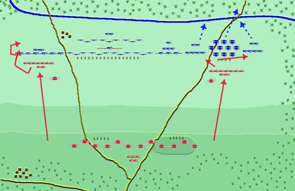 Description